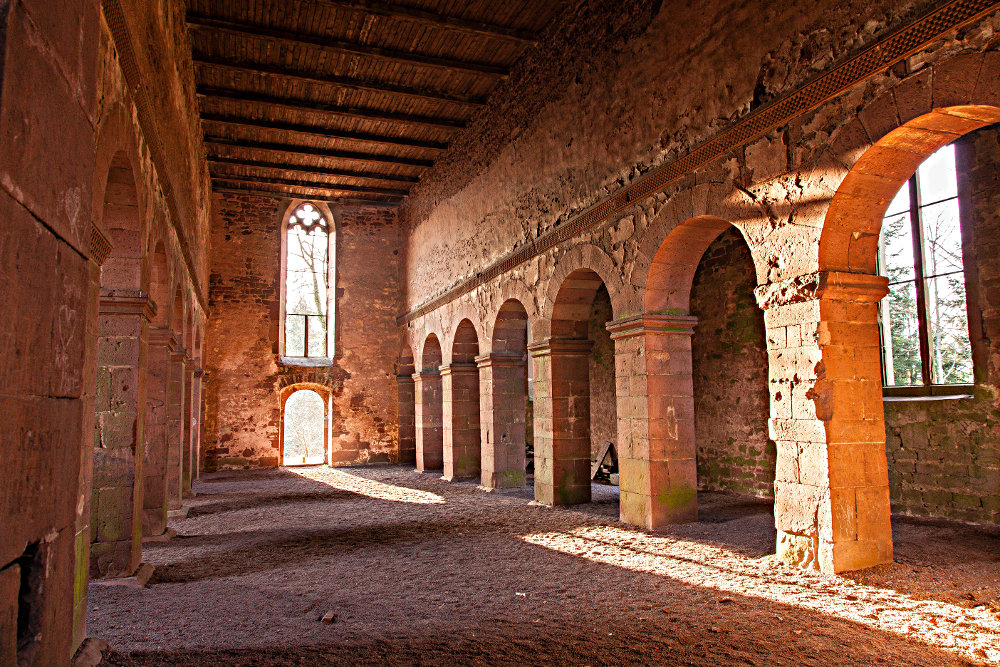 Gotthardruine in Weilbach (Bayern), Innenansicht Westseite